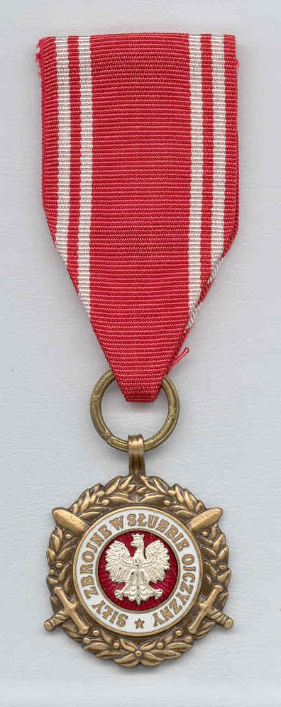 BM SZwSO (skan). Autor skanu: Joy